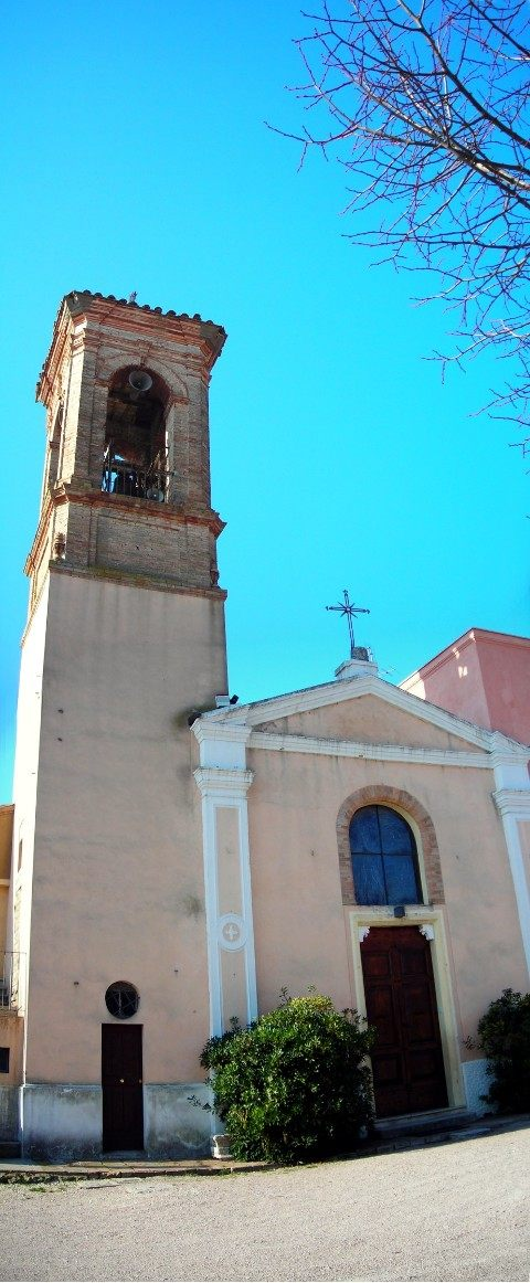 church of San Giovanni Battista, Pieve di Campo, Ponte San Giovanni, Perugia, Umbria, Italy